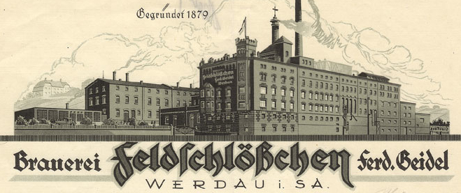 Die Feldschlösschen-Brauerei in Werdau; historische Karrikatur.